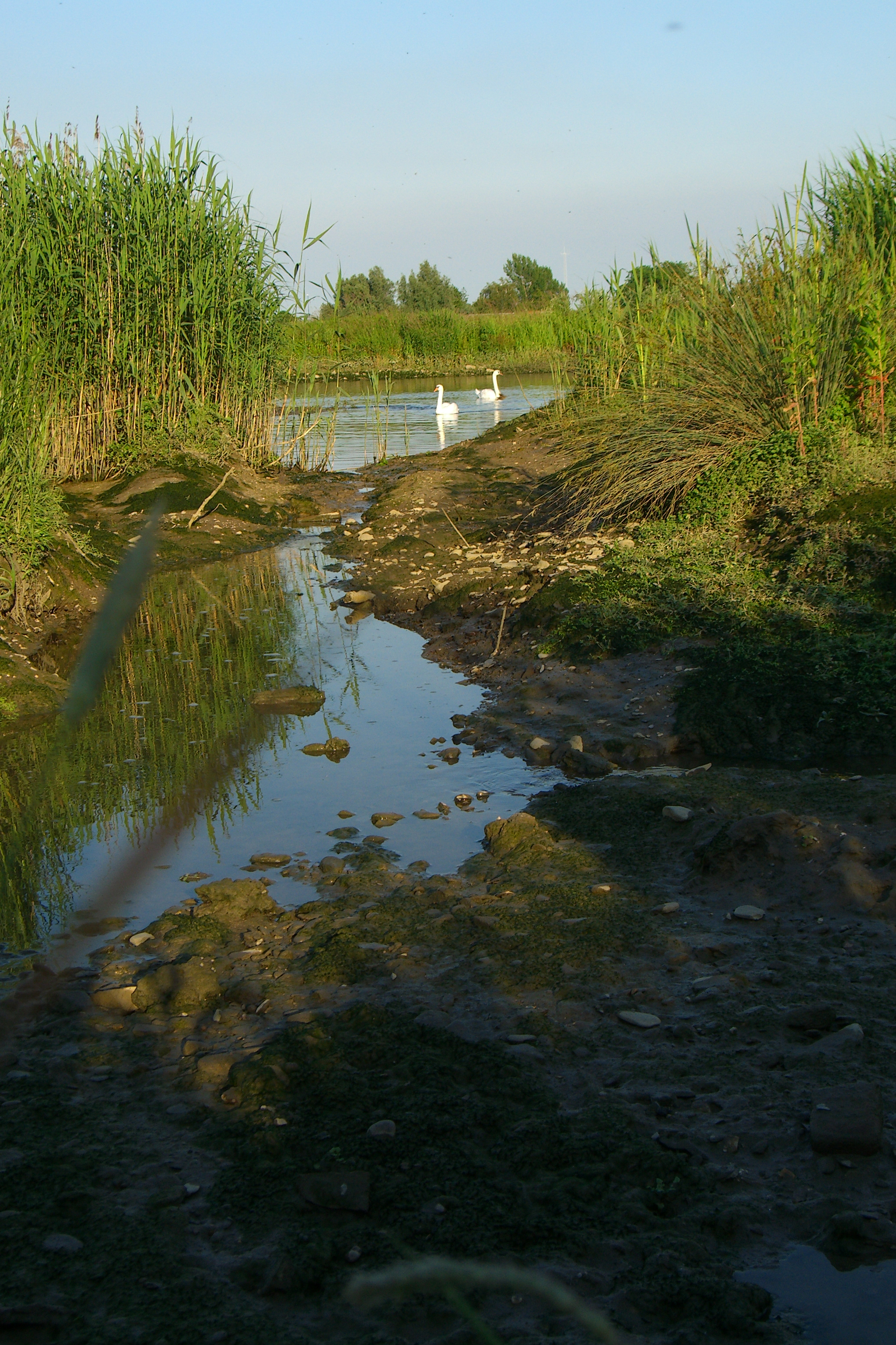 De rivier 'de Lek' gezien vanaf de dijk bij Opperduit te Lekkerkerk. Foto gemaakt op 13-06-2005 door Bart Roorda te Lekkerkerk.